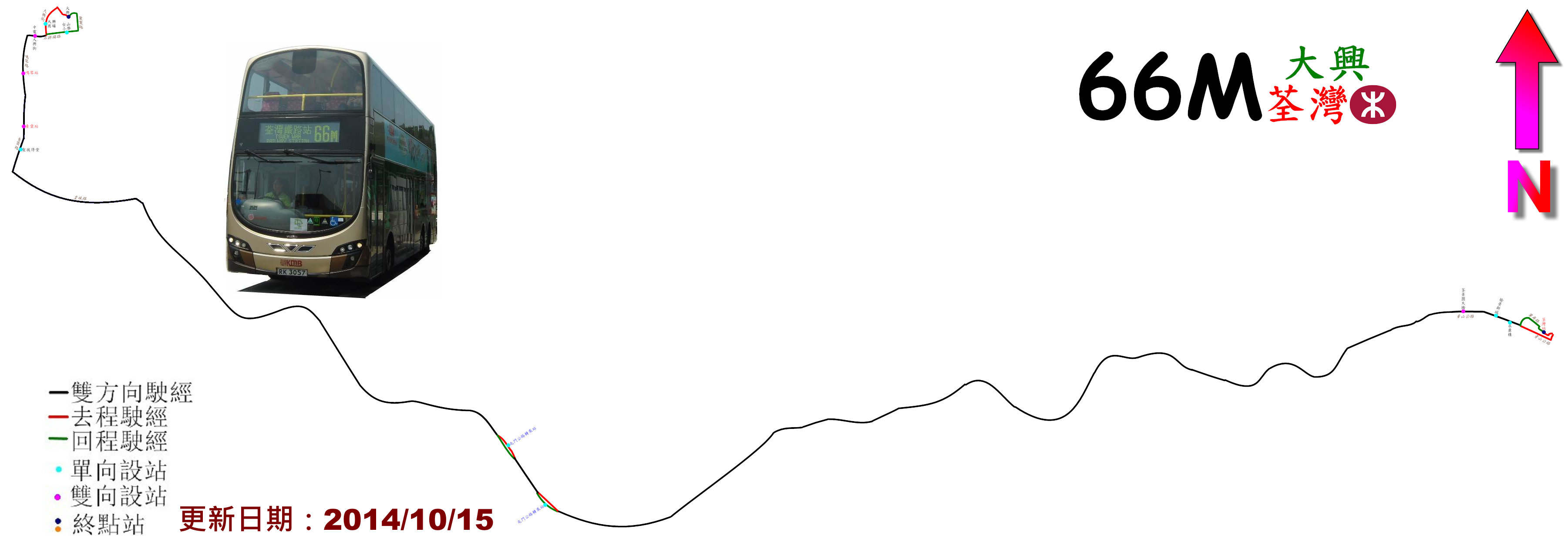 中文（香港）: 九巴66M線及66P線的走線圖，當中藍線表示只有66P駛經